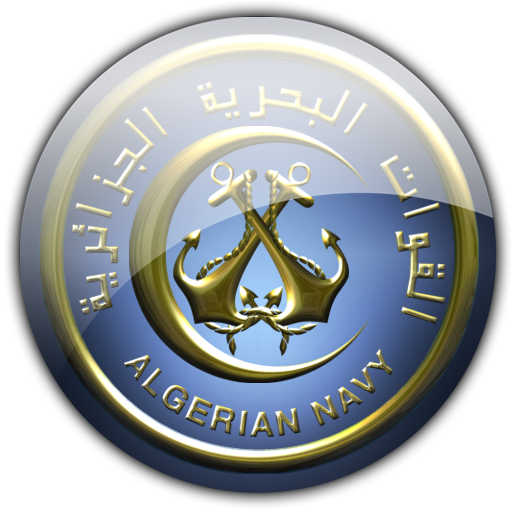 écusson des forces navales algériennes